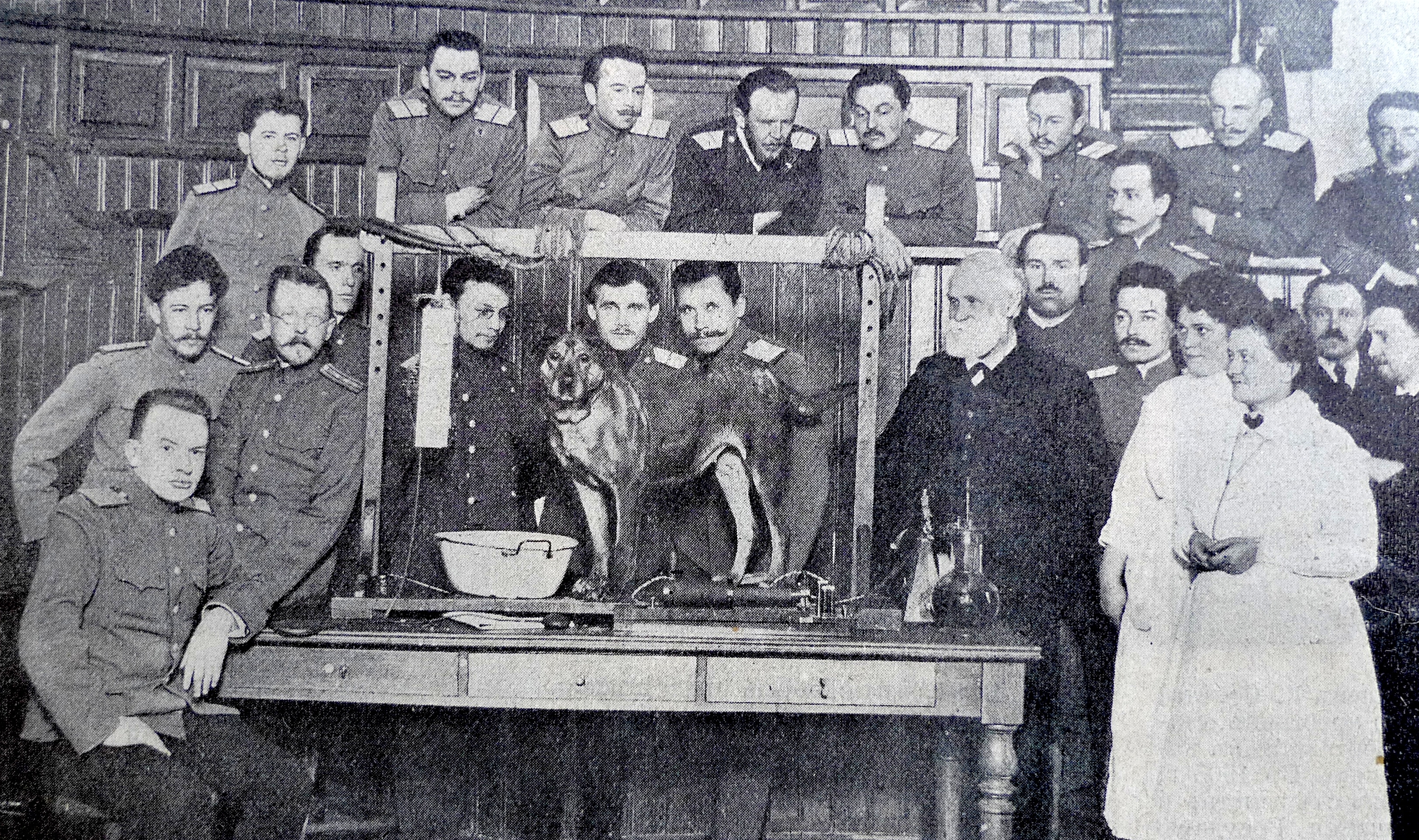 Ivan Pavlov qui présente une de ses expériences.